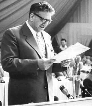 Zentralbild Ulmer 16.7.1958. V. Parteitag der SED vom 10. bis 16.7.1958 in der Werner-Seelenbinder-Halle, 7. Tag. UBz: Der Erste Sekretär der Bezirksleitung Schwerin der SED, Bernhard Quandt, der den Vorsitz der Schlußsitzung hatte, verlas Grussadressen, die von Betrieben an den Parteitag gerichtet wurden.